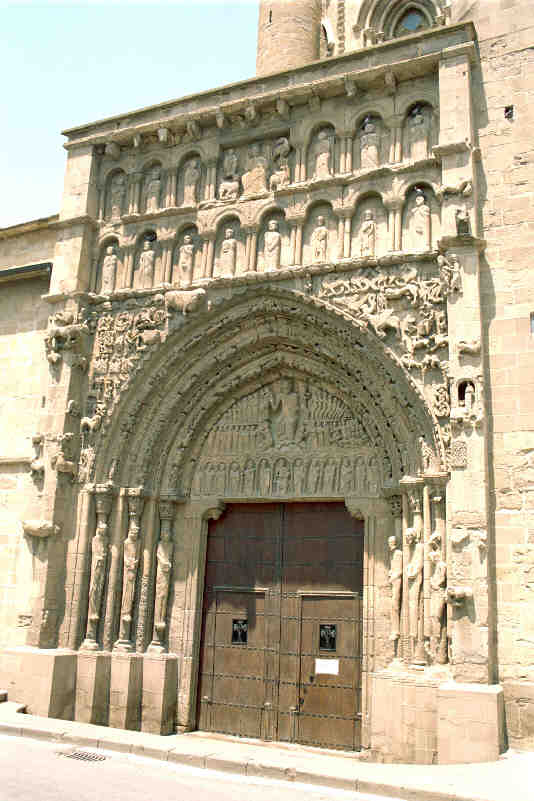 Pórtico de Santa María la Real en Sangüesa, en la provincia de Navarra, (España). Tomada por JMSE el 9 de julio de 2003 y cedida a Wikipedia. Categoría: España (imagen) Categoría: Monumentos (imagen)